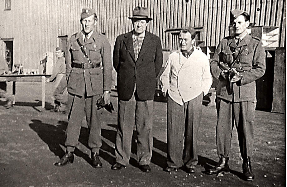 RA/PA-1193/V/0001 1098